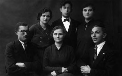 Grupa młodzieży w Wilnie. Od lewej w pierwszym rzędzie: Marian Pieciukiewicz, Maria Poźniak (żona Jana Poźniaka), Józef Malecki. Stoją od lewej: (?) B. Klepacki, Wiktoria Poźniak (siostra Jana Poźniaka).